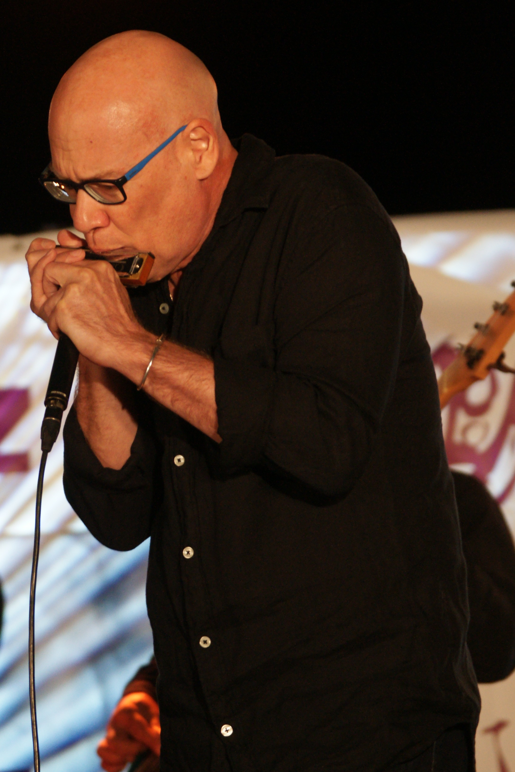 Olivier Ker Ourio, Coartjazz 2018, Coaraze